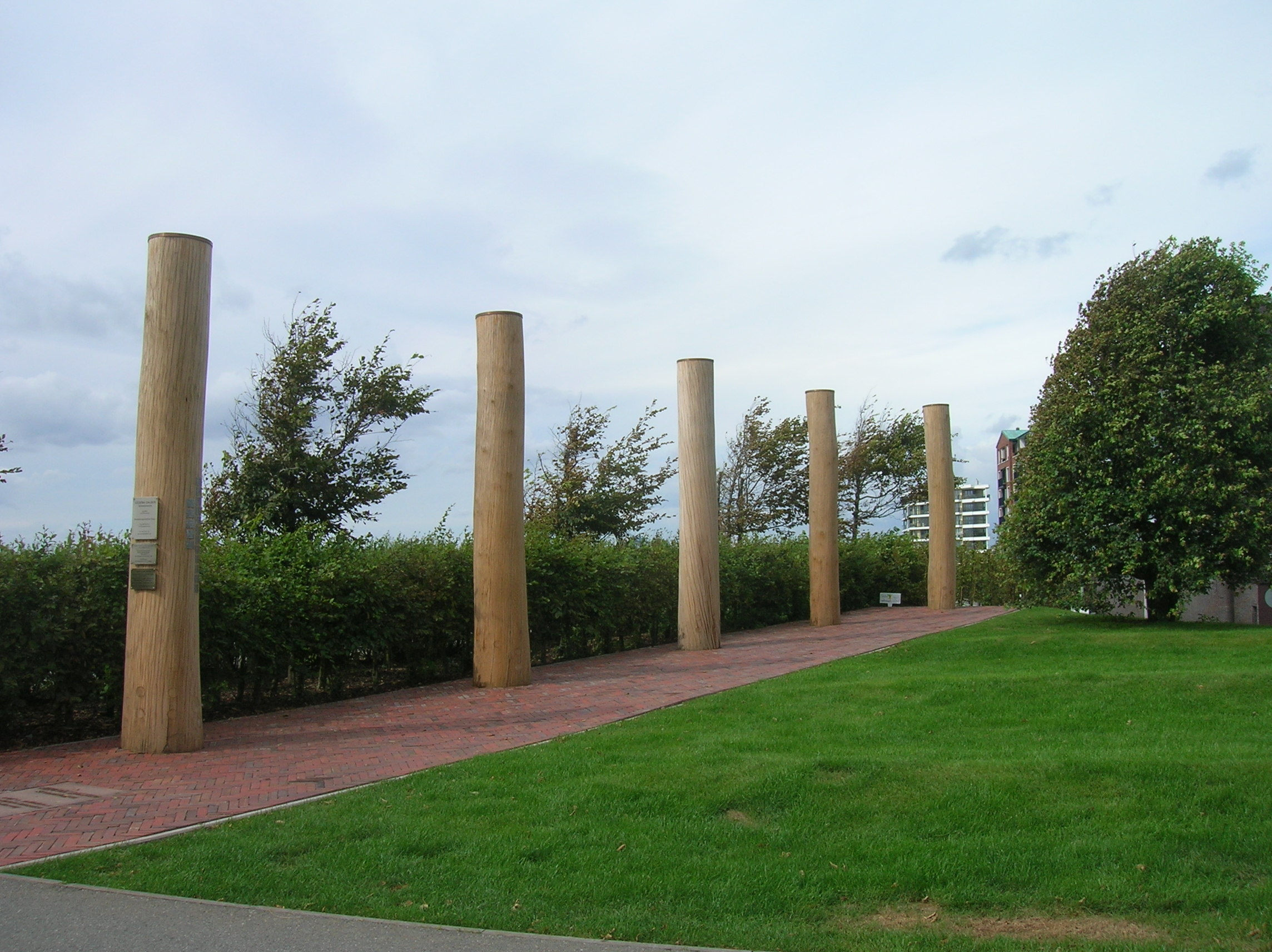 Gedenk-Dalben für Seebestattete auf dem Weserdeich in Bremerhaven.